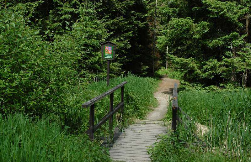 Červené blato – vchod do rezervace